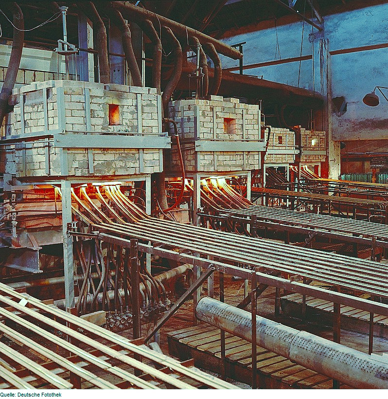 Original image description from the Deutsche Fotothek Facharbeiter für Glastechnik